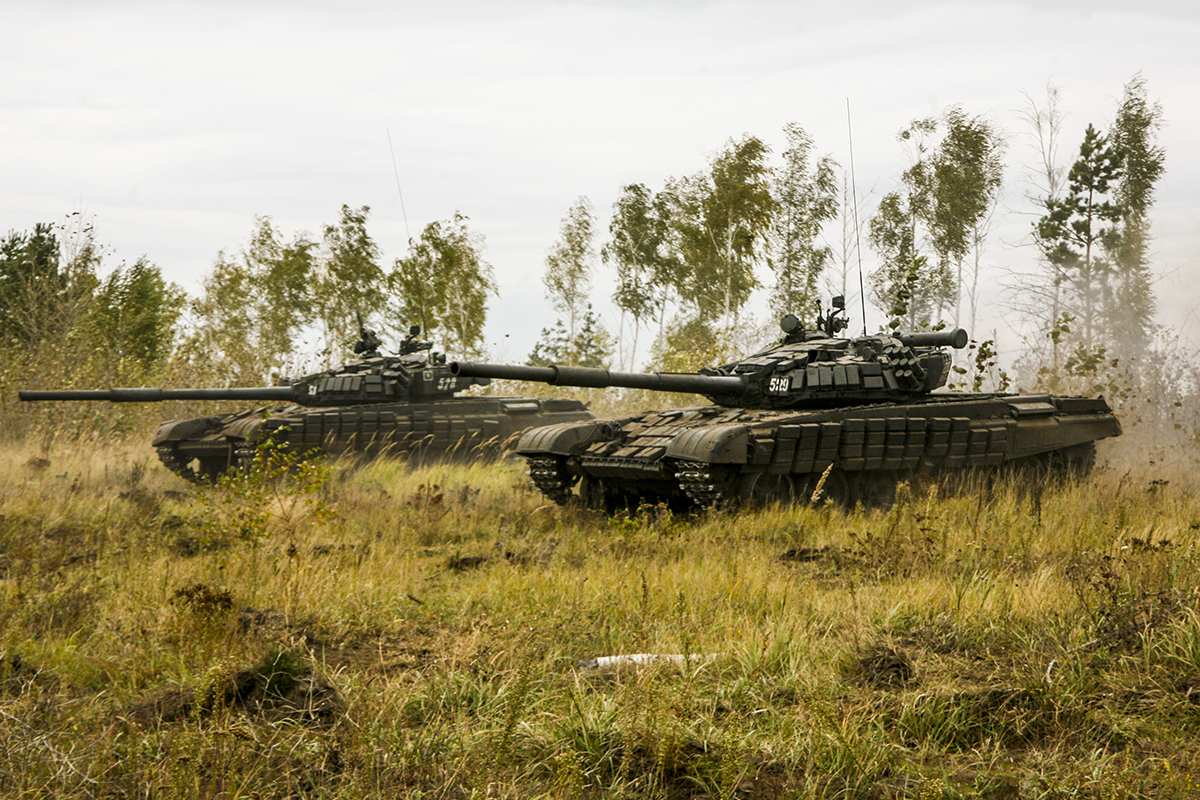 Танкисты 3-й мотострелковой дивизии на Т-72Б уничтожили условное незаконное вооруженное формирование в Воронежской области.